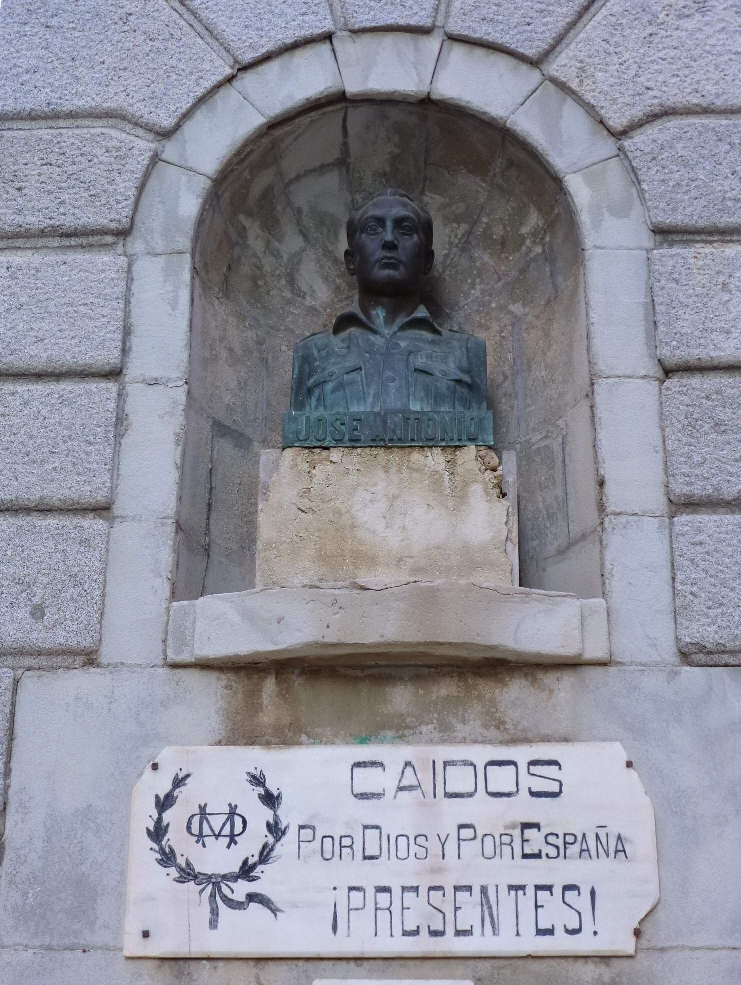 Ocaña, Toledo - Monumento a los Caídos del bando rebelde (nacional, franquista) en la Guerra Civil Española